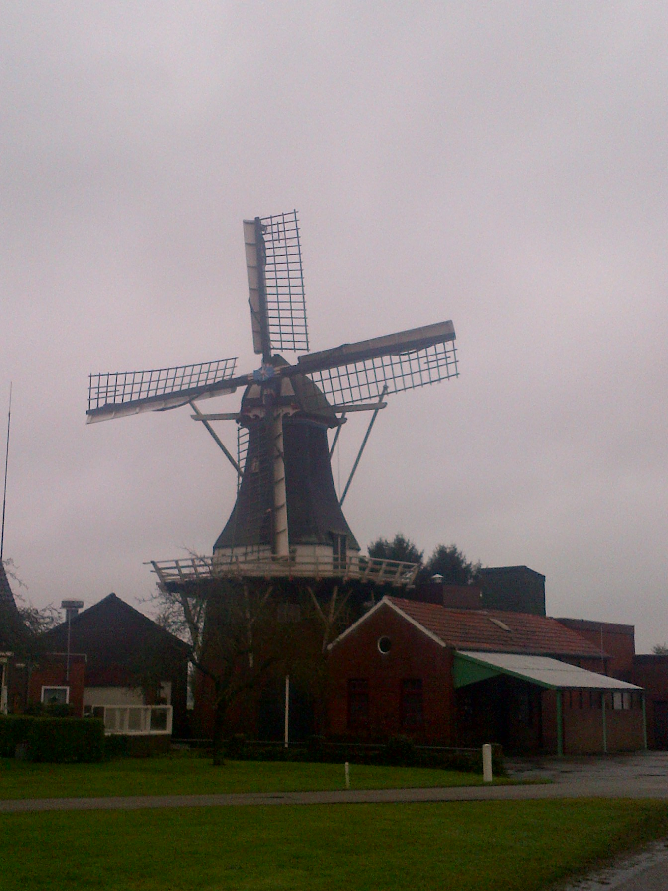 molen Veelerveen